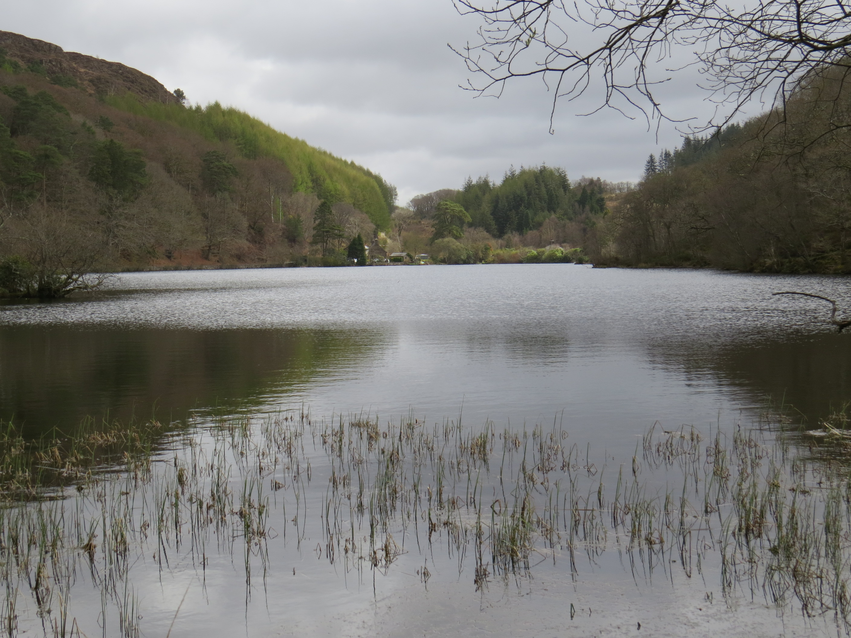 Llyn Mair, Tan y Bwlch